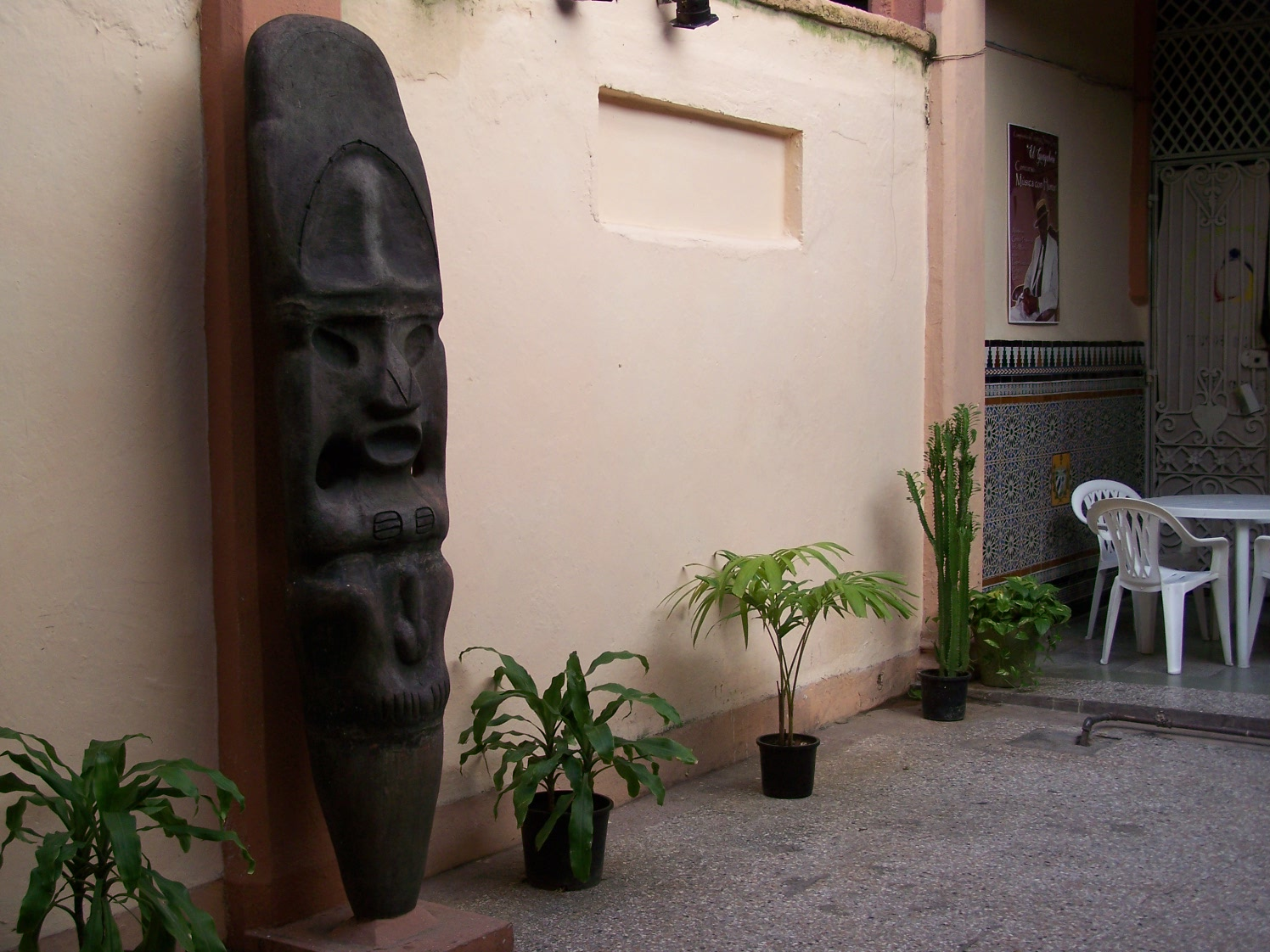 Fiesta en Bariay